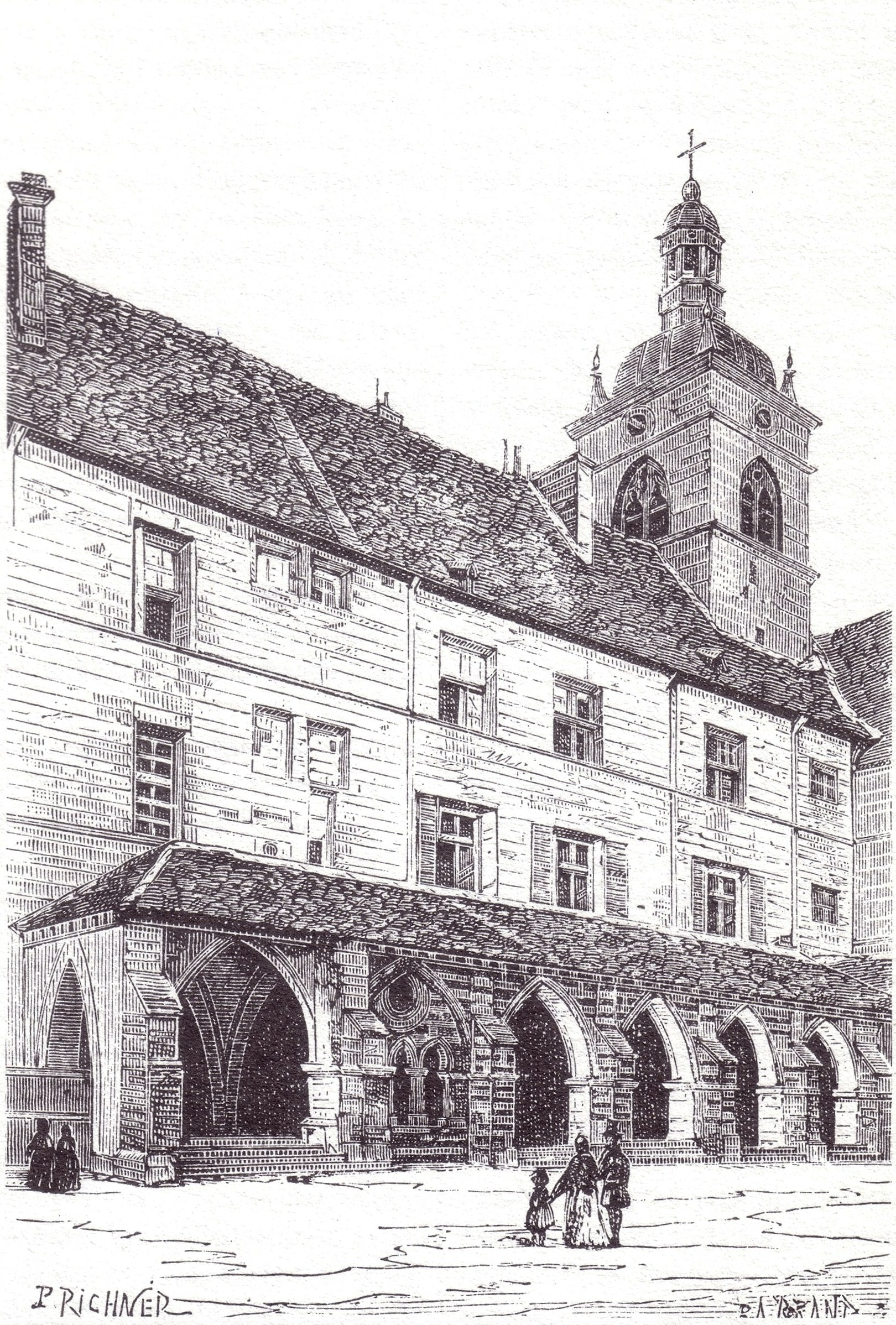 Gravure de l'abbaye de Luxeuil au XIXème siècle.